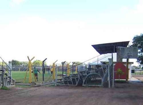 Tribuna del estadio Estadio José Pedro Damiani